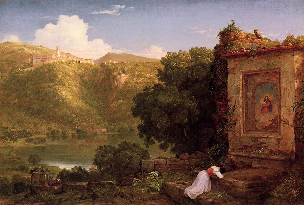 II Penseroso